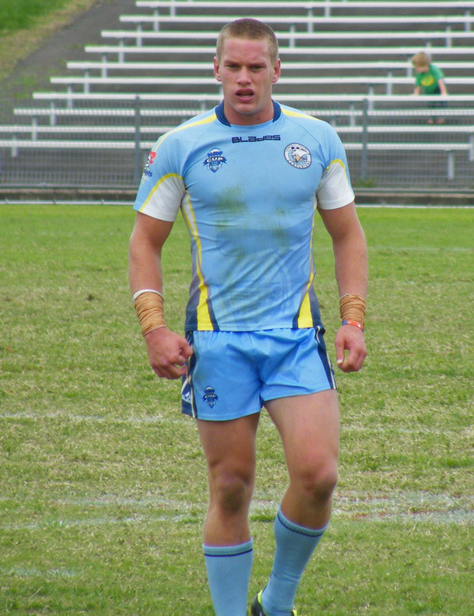 Kyle o'donnell